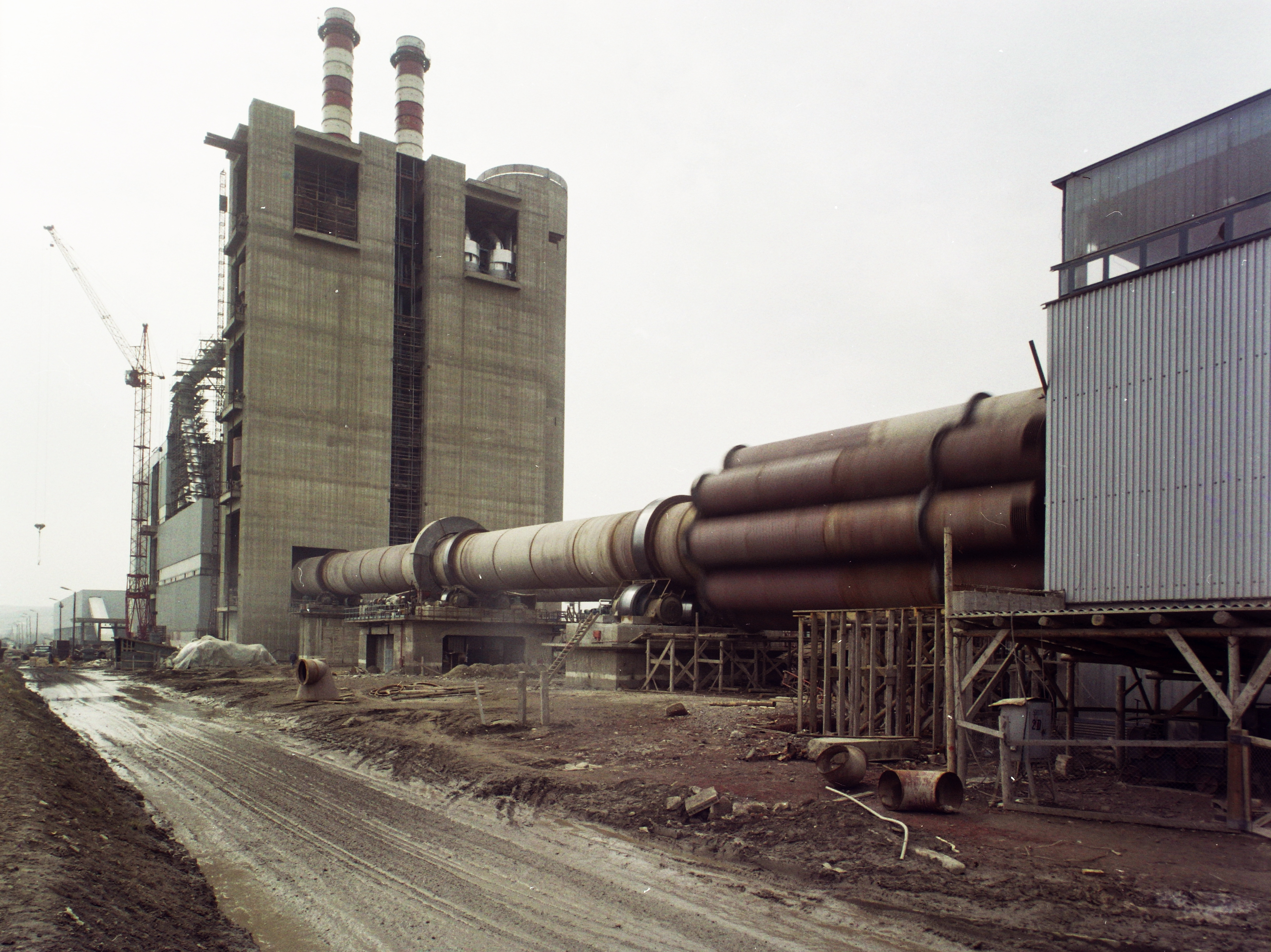 Hejőcsabai cementgyár. Location: Hungary Tags: colorful, factory, construction Title: Hejőcsabai cementgyár.